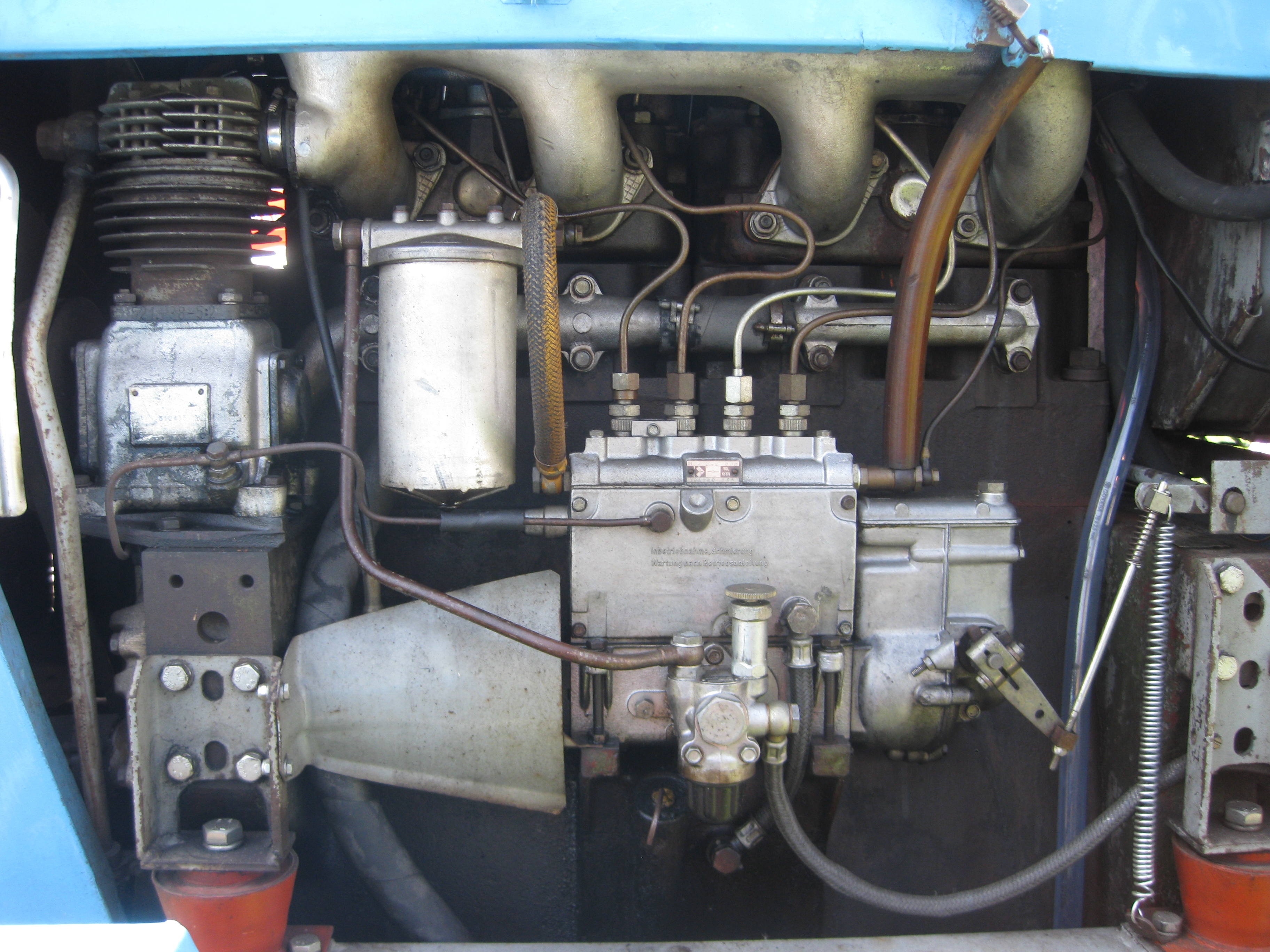 Motor 4 VD 14,5/12-1 SRW des Traktors Fortschritt